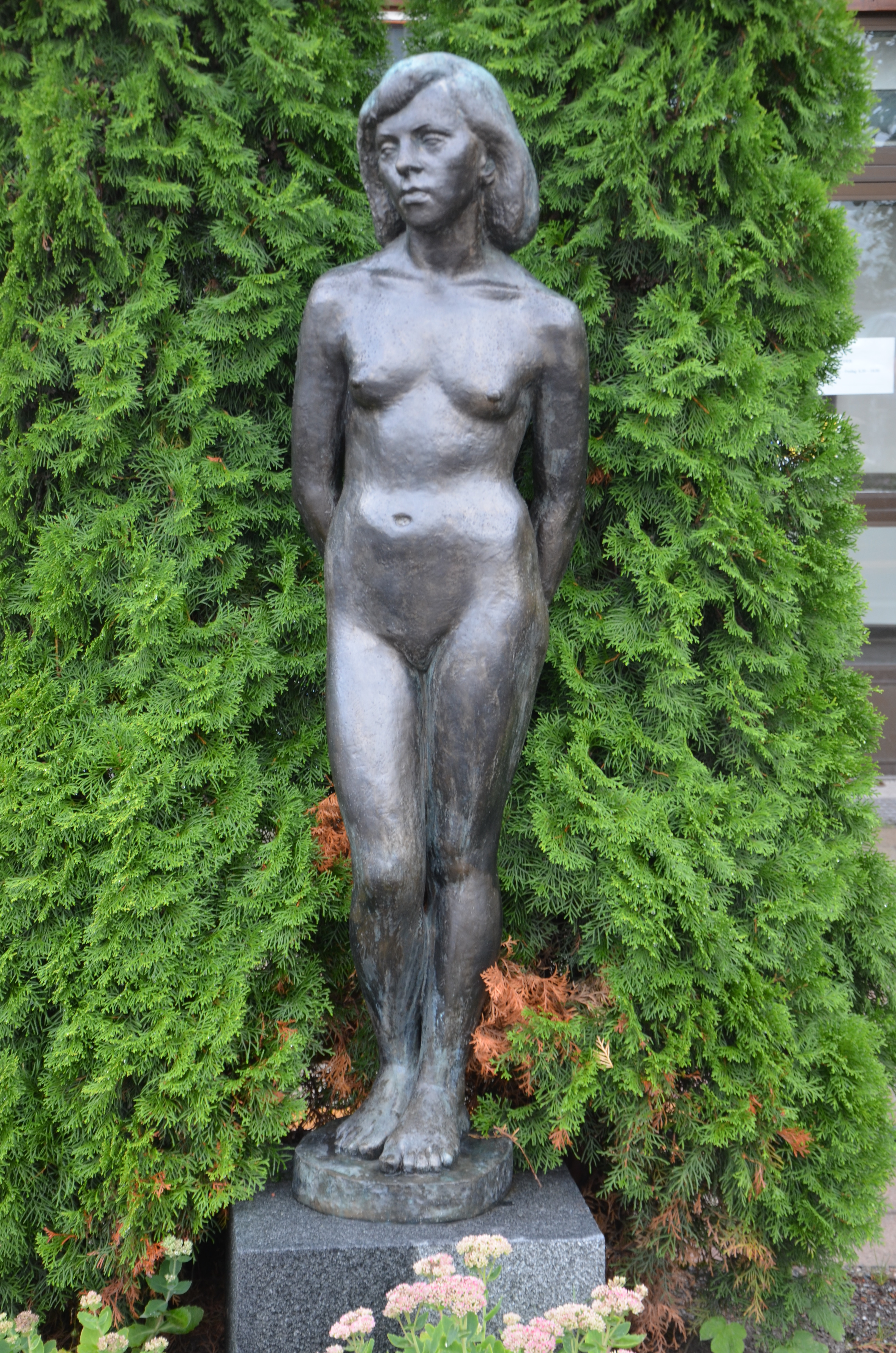 "Bianca", av konstnär Sten Ericson (1909-2001), brons, rest 1953, Holbergsgatan 53 i Blackebergs centrum, Stockholm.